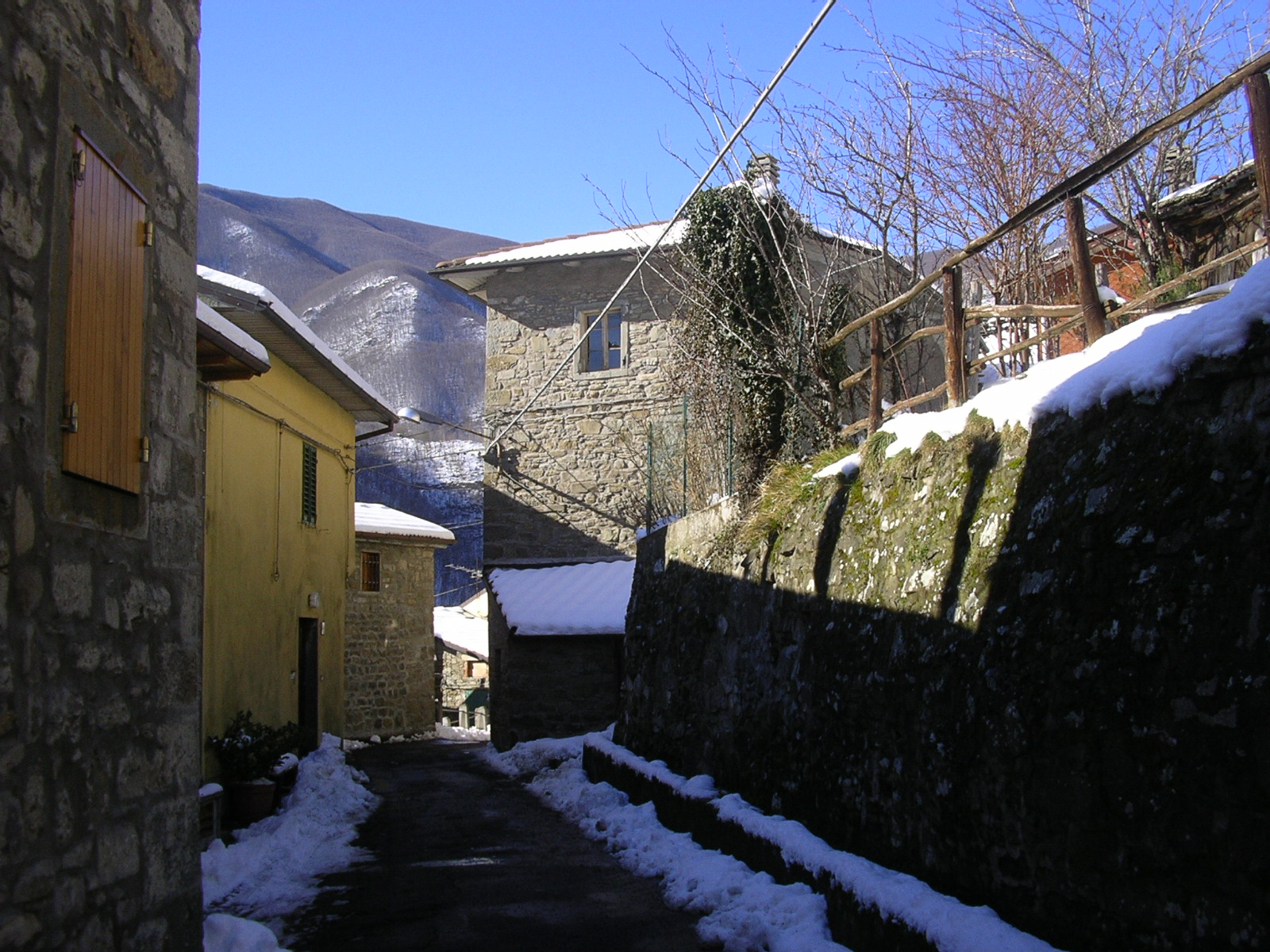 Casa Calistri - Abitazioni caratteristiche I